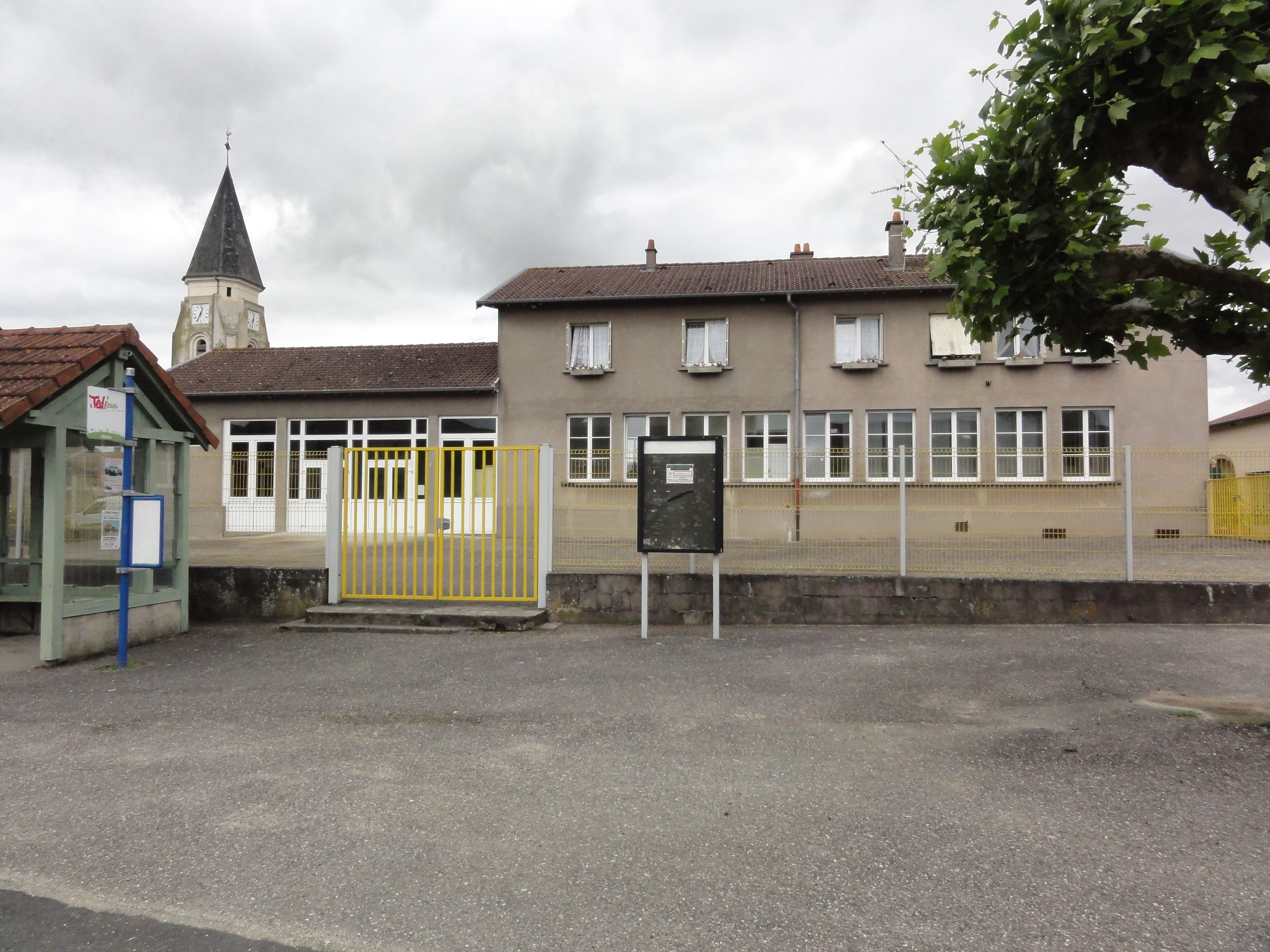 Coincourt (M-et-M) mairie-école